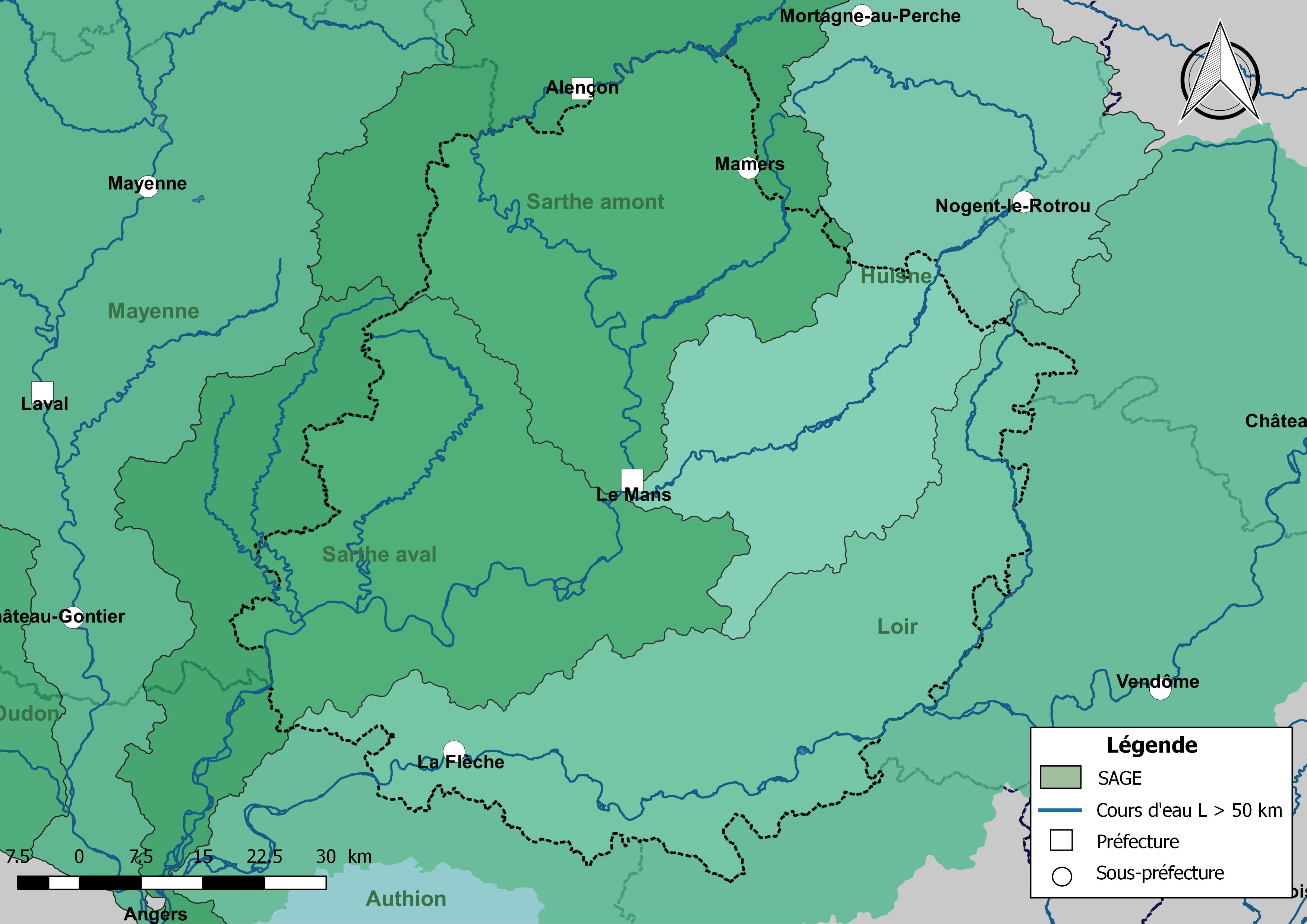 Carte des schémas d'aménagement et de gestion des eaux (SAGE) concernant le département de la Sarthe (France) au 1er janvier 2018.